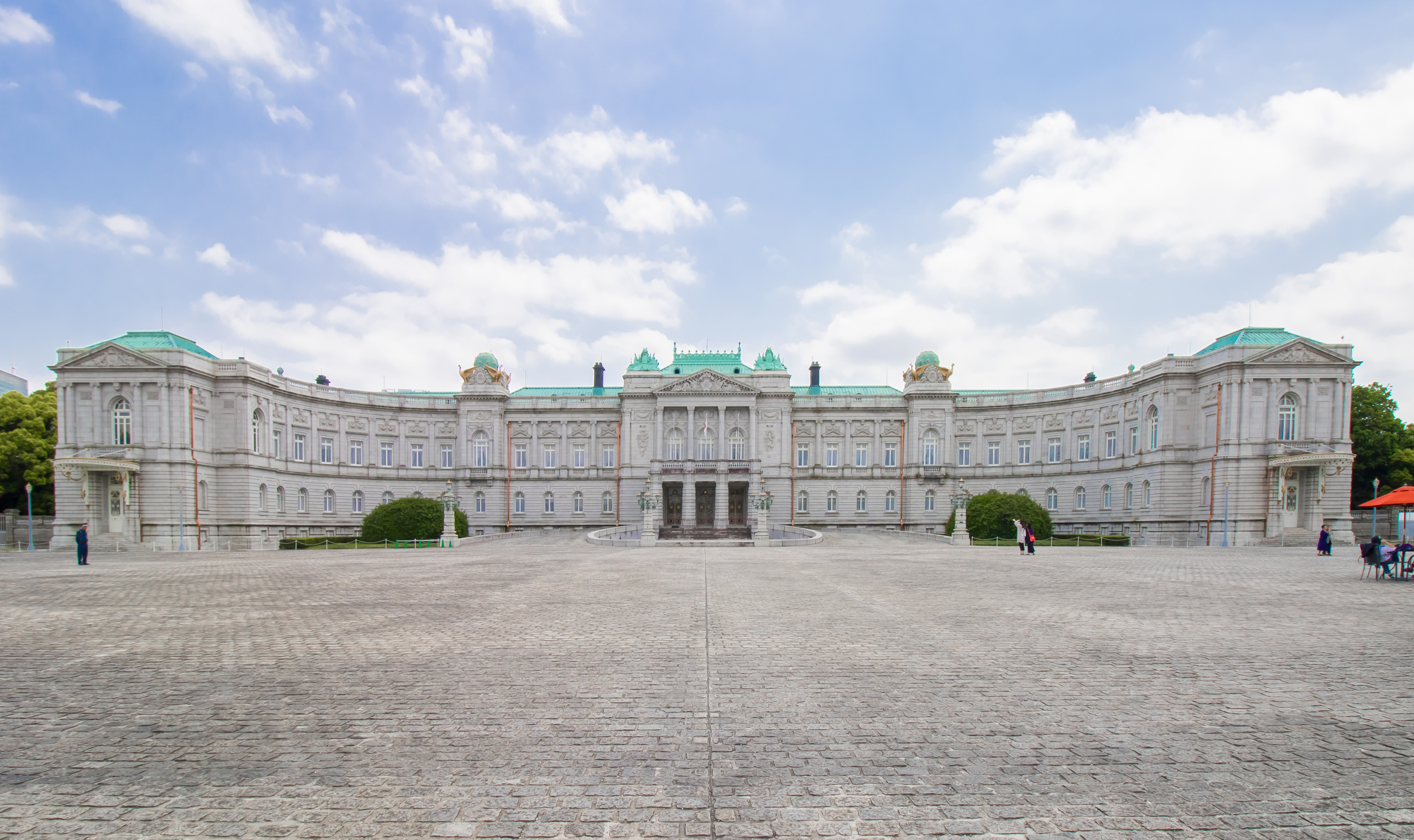 赤坂迎賓館（国宝）